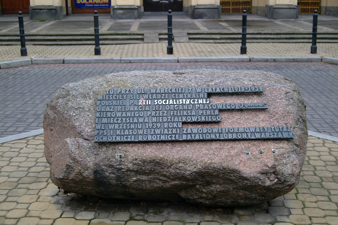 Kamień i tablica pamiątkowa, upamiętniająca redakcję "Robotnika" ul. Warecka 7, Warszawa